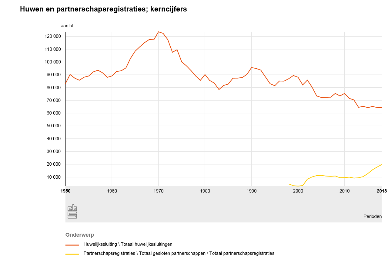 Huwelijkssluitingen en geregistreerd partnerschap vanaf 1950